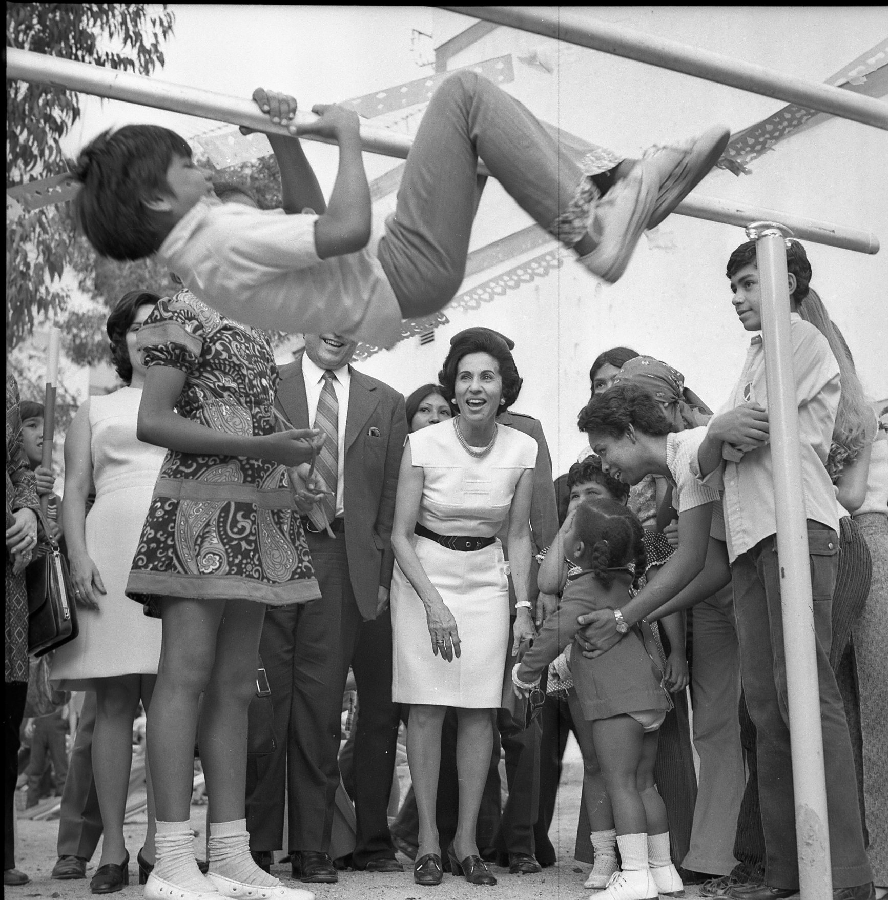 Alicia Pietri de Caldera durante la inauguración de un Parque de Bolsillo en Caricuao, Caracas.